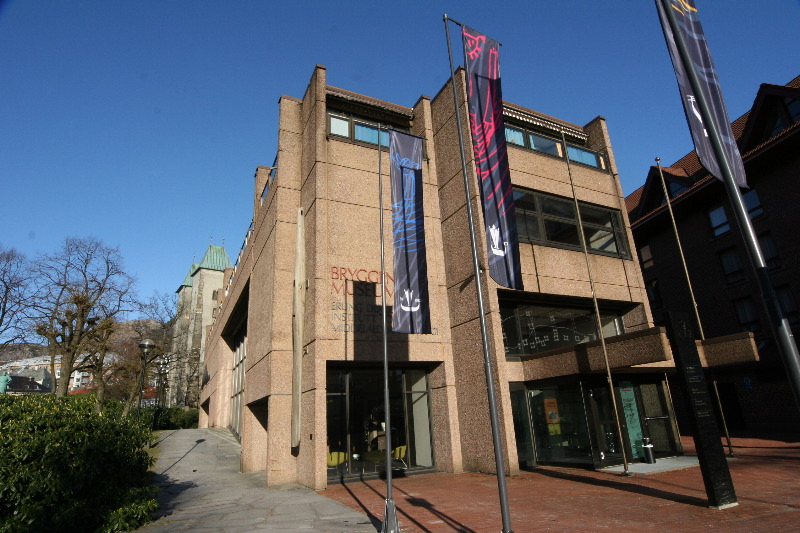 Bryggen museum, Bergen (Norway)